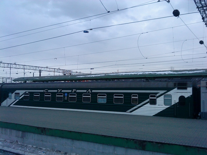 Пенза - Москва - Пенза